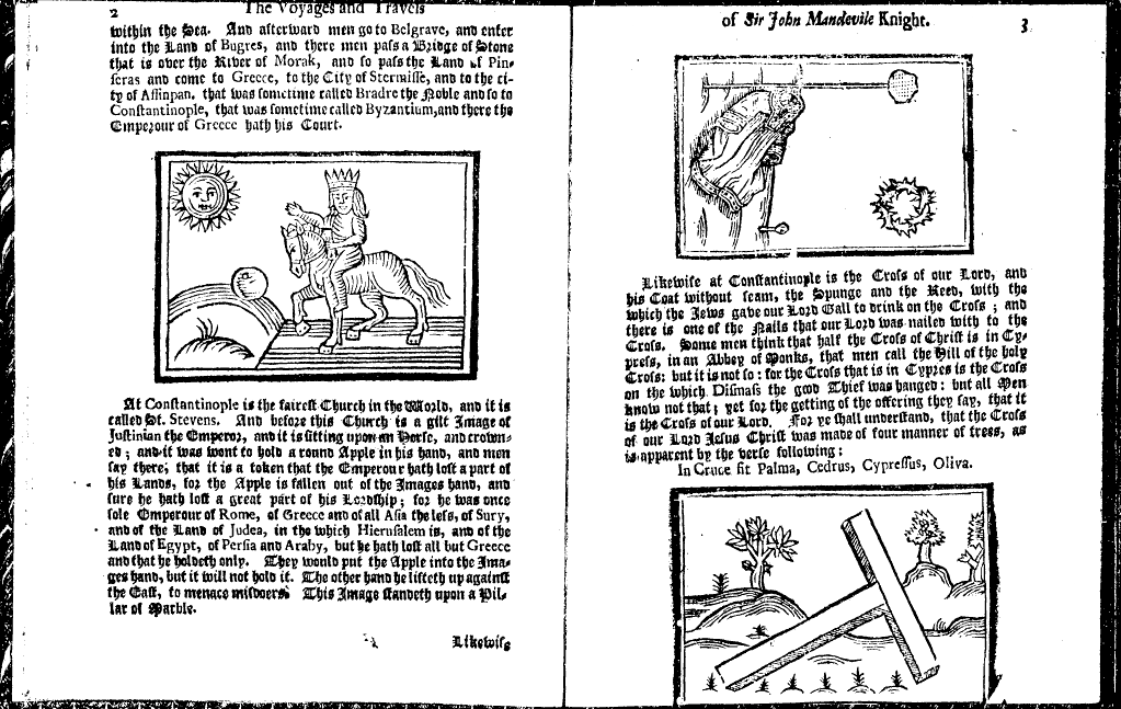 Seiten aus: The voyages & travels of Sir John Mandevile, Knight wherein is set down the way to the Holy Land, and to Hierusalem: as also to the lands of the great Caan, and of Prestor John: to Inde, and divers other countries: together with many and strange marvels therein (London: Printed for Rich. Chiswell, B. Walford, Mat. Wotton, and Geo. Conyers, 1696).